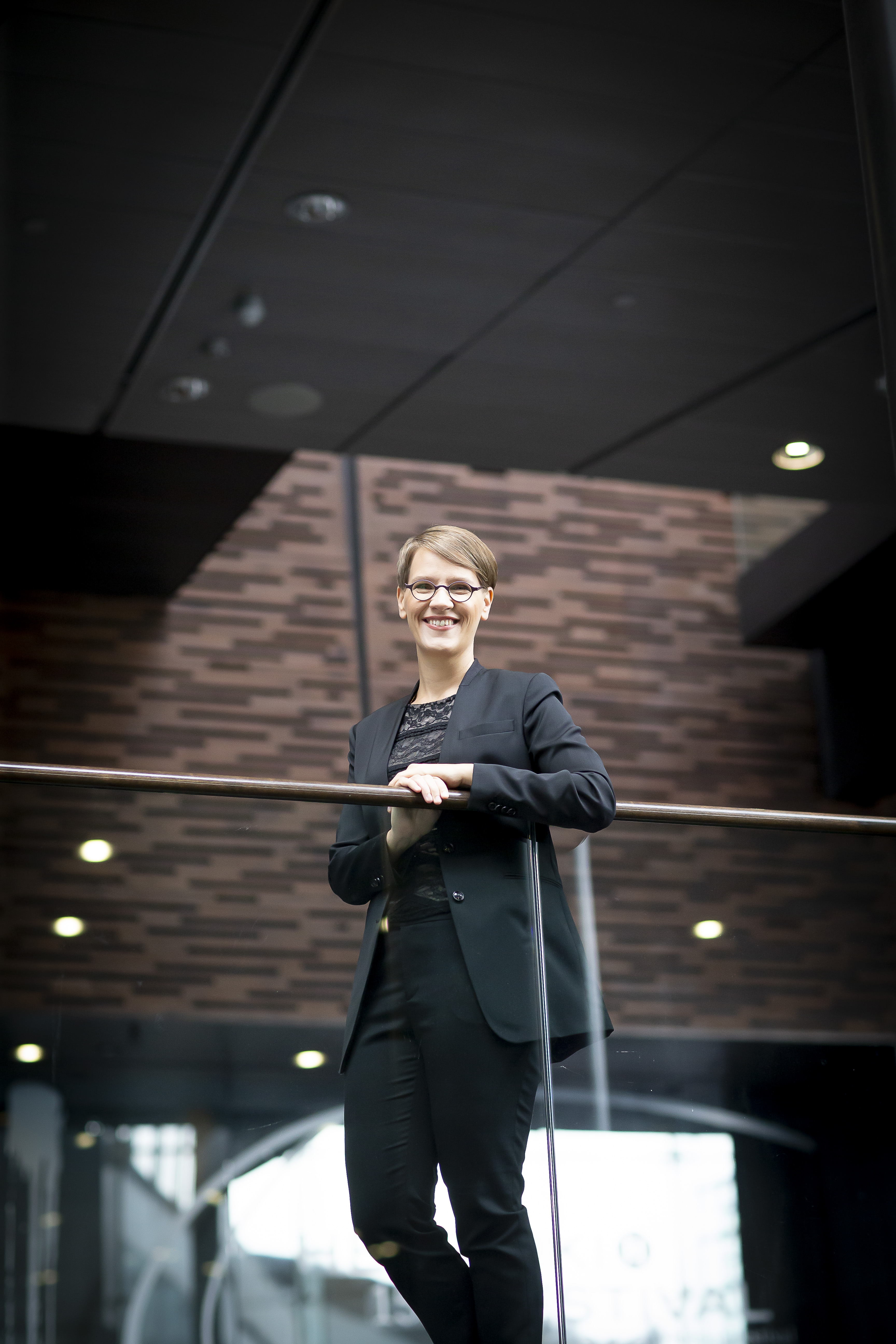 Saara Aittakumpu vuonna 2019.